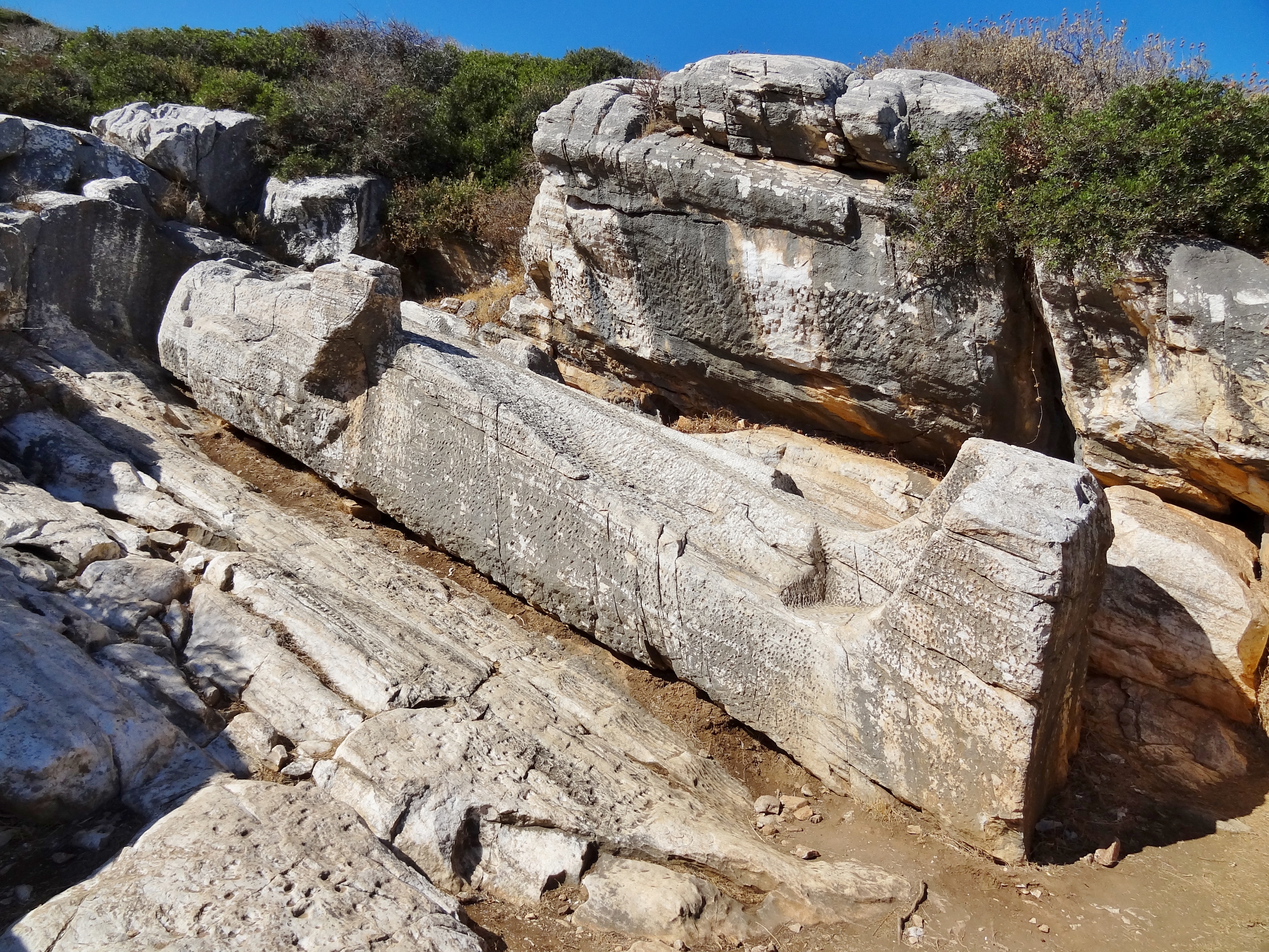 Kouros (Statue des Dionysos) oberhalb von Apollonas im Nordosten von Naxos, Kykladen, Griechenland